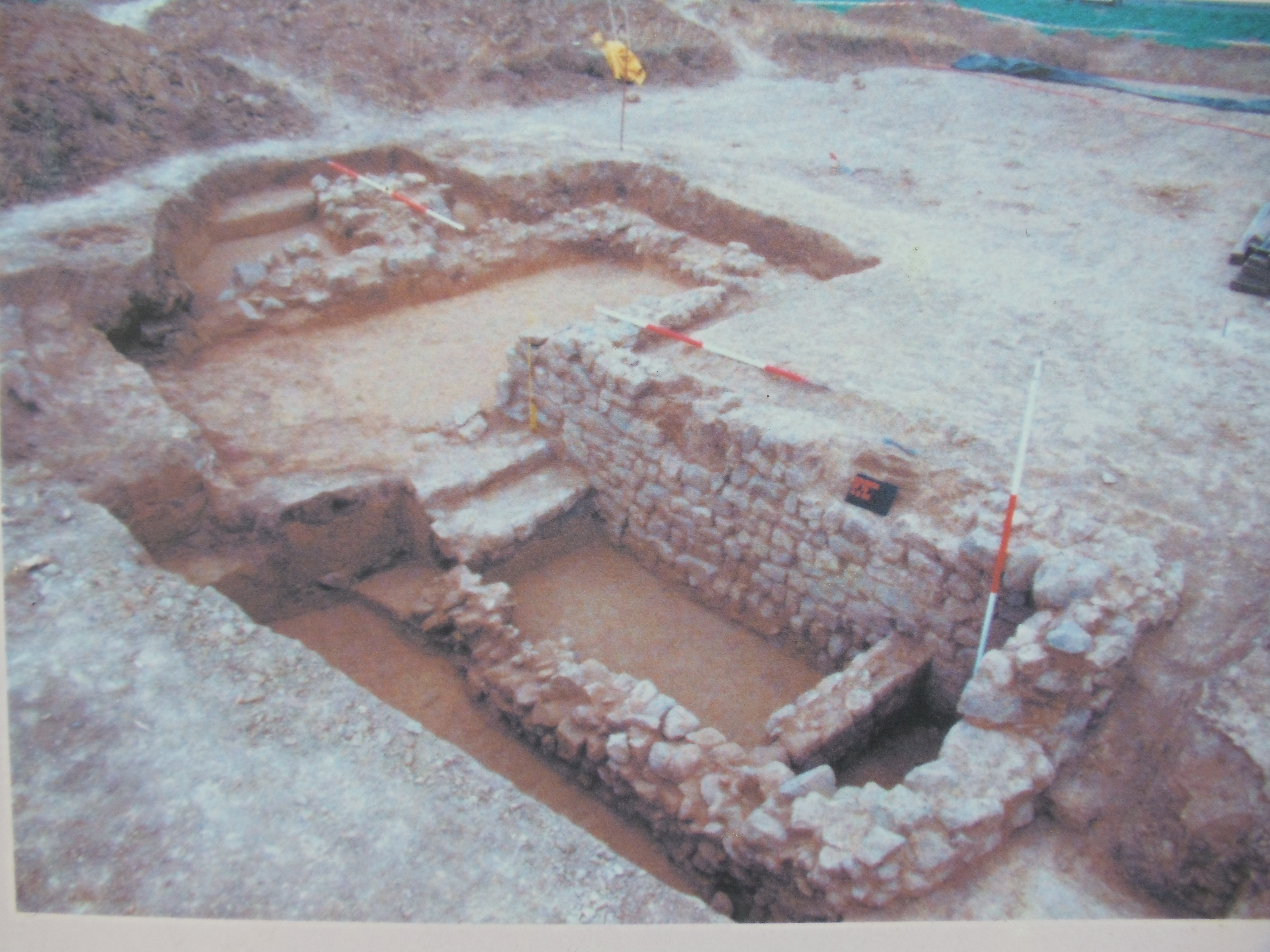 Foto der Abbildung auf der Informationstafel der Bonifatius-Route, Zwischenstation Bonifatiusbrunnen. Original: Archäologisches Museum Frankfurt am Main